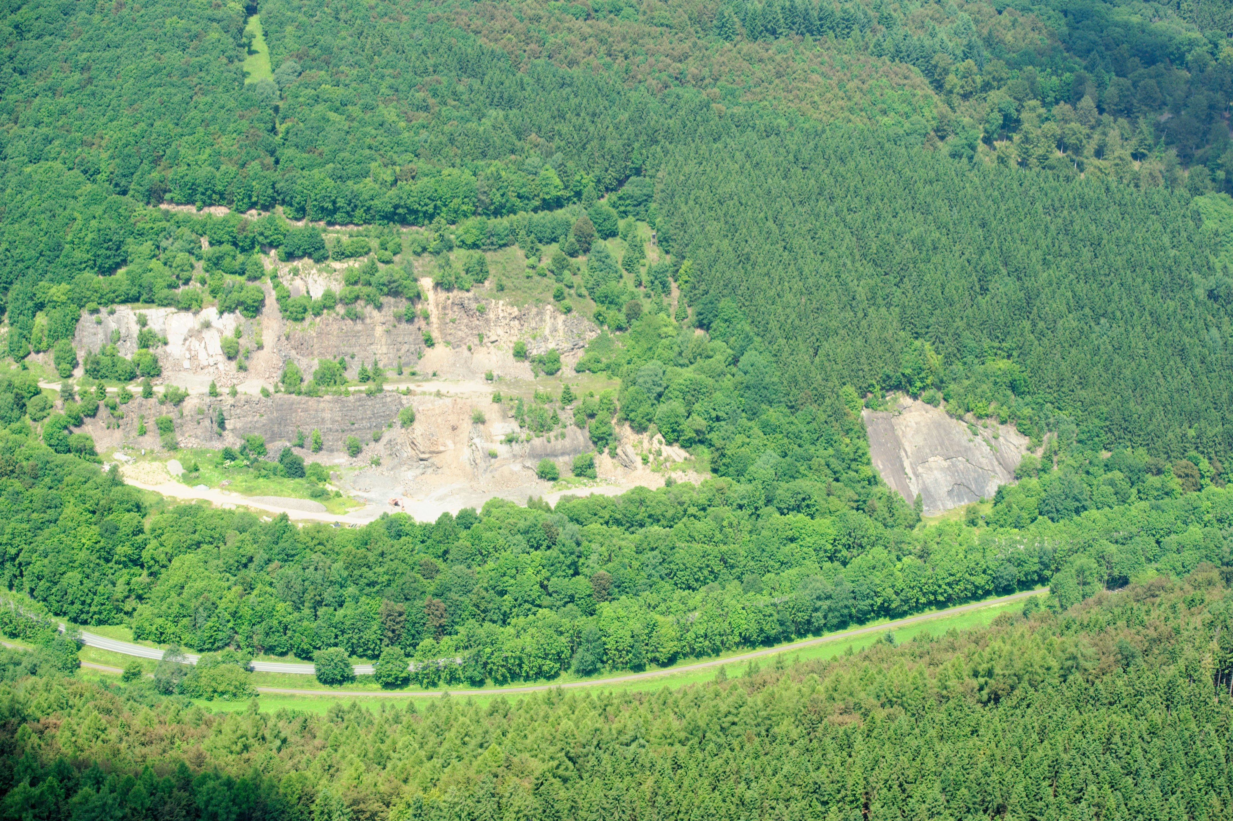 Fotoflug Sauerland-Ost: Steinbruch Nuhnetal an der Südflanke des Steinschab nordwestlich von Hallenberg; Bundesstraße 236. The making of this document was supported by the Community-Budget of Wikimedia Germany.